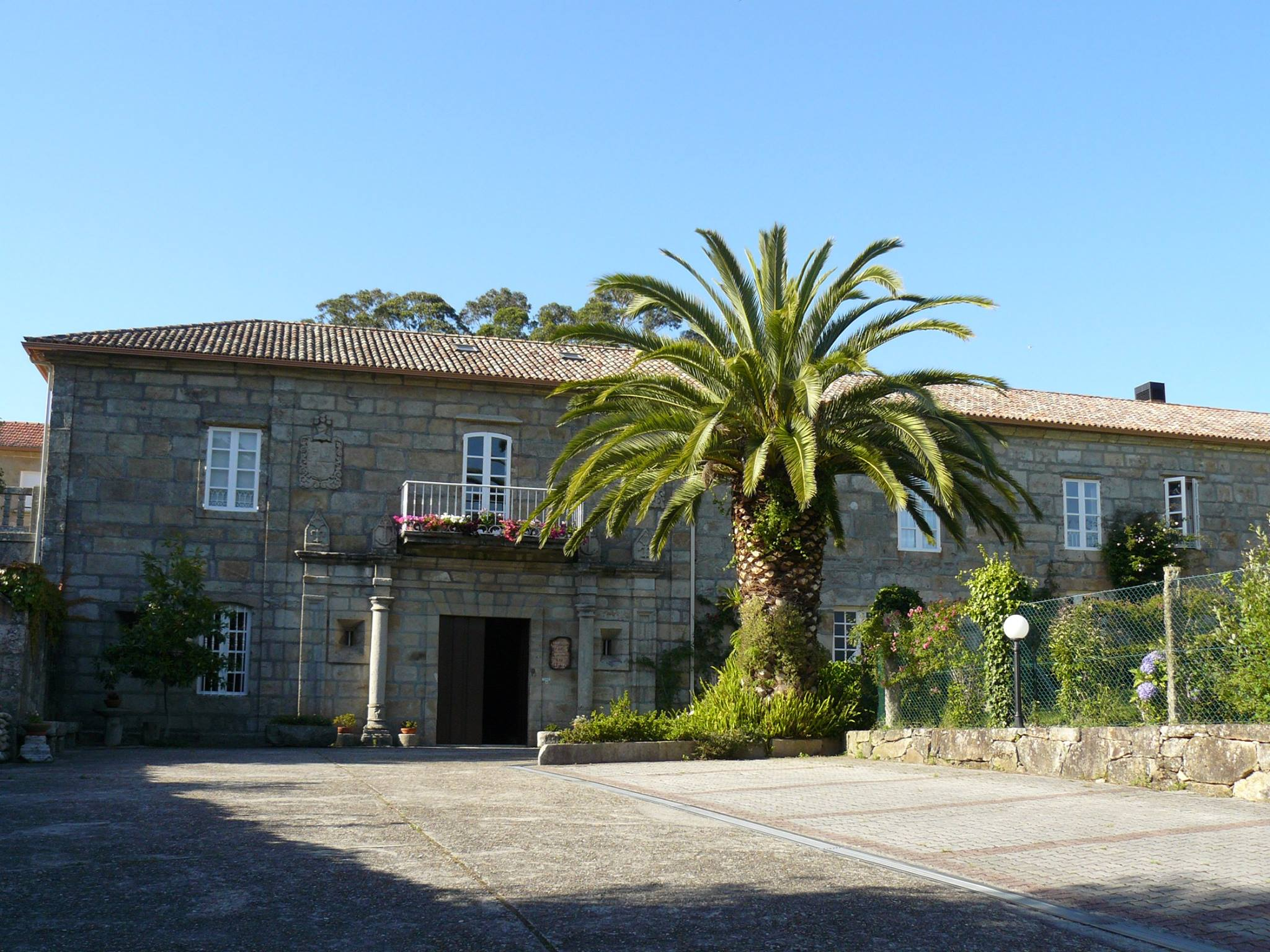 Pazo de Pías